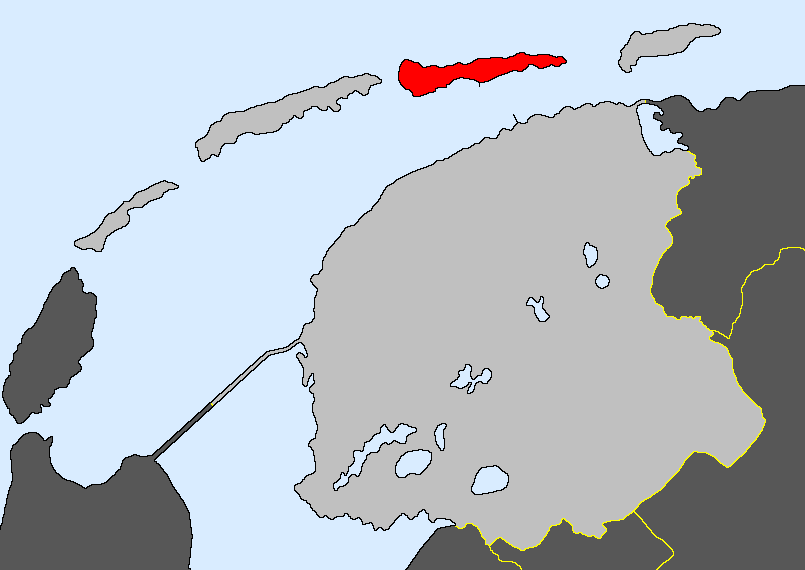 Nedersaksies: t Gebied waor Amelaands spreuken wordt